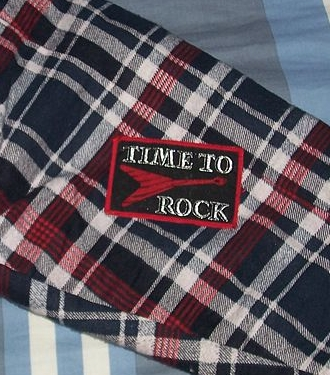 Time to Rock patch op een jas